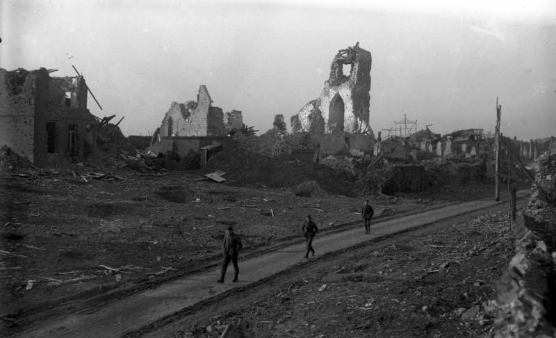 Cantaing die Kirche Febr. 1918